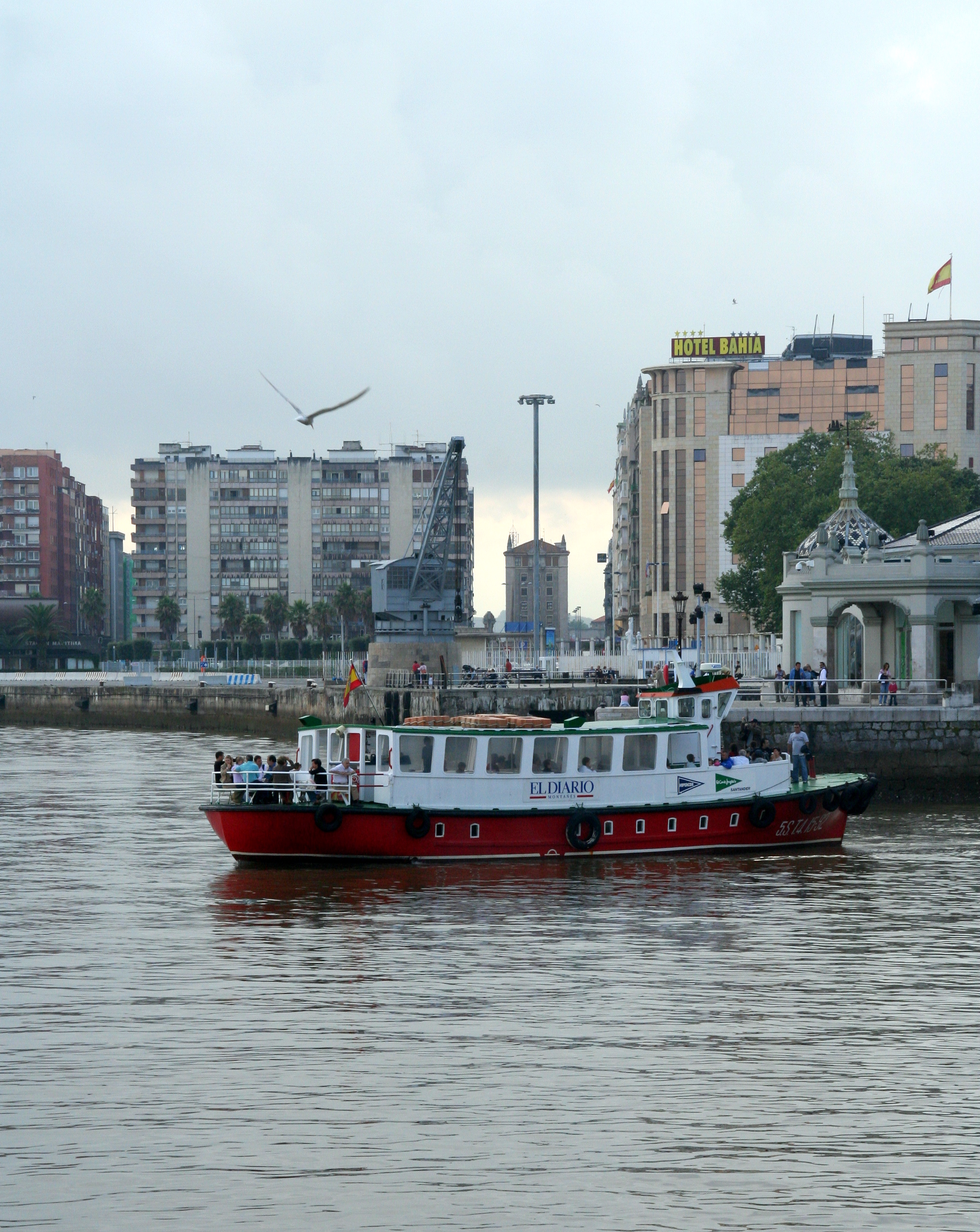 Lancha de Los Regina atracando en el embarcadero de El Palacete, en Santander (Cantabria, España)